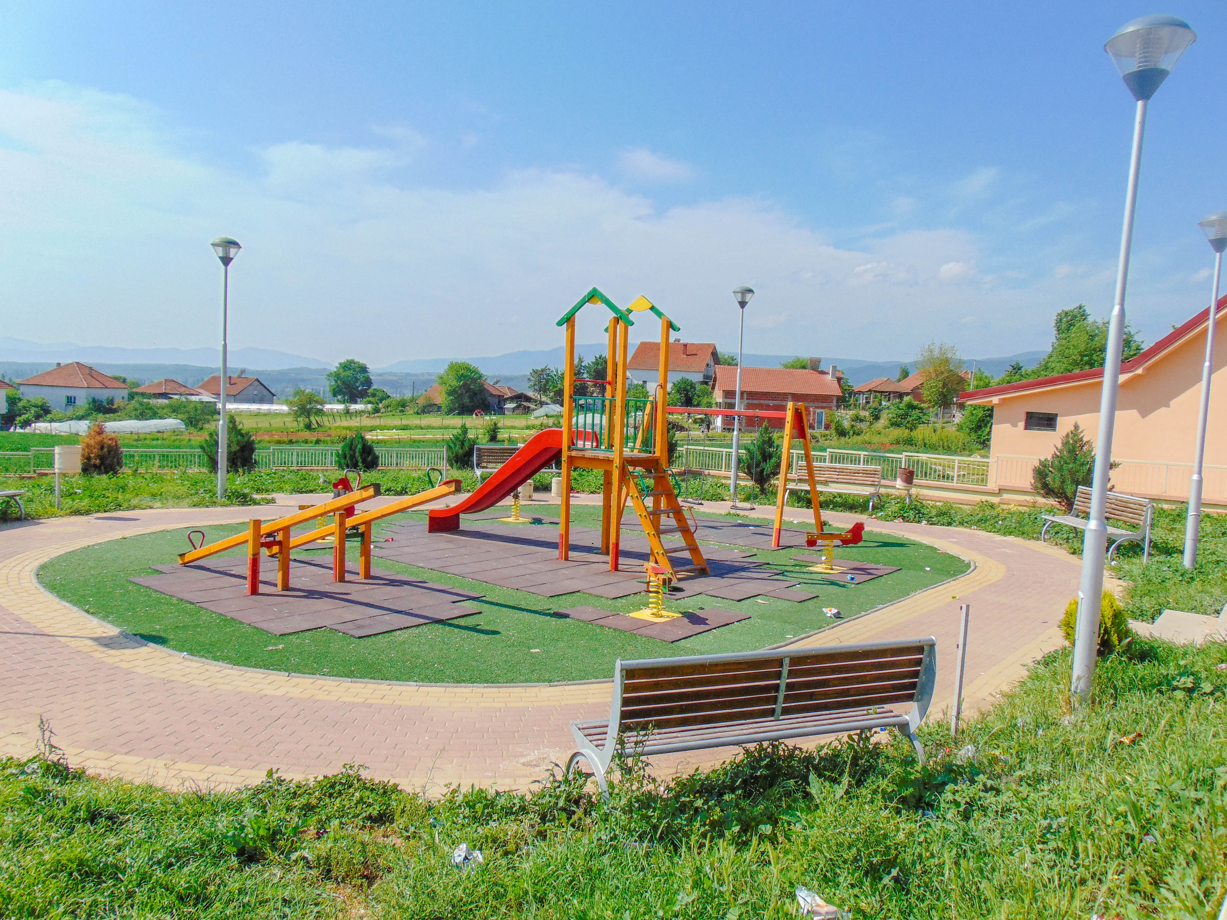 Злеово - Општина Радовиш